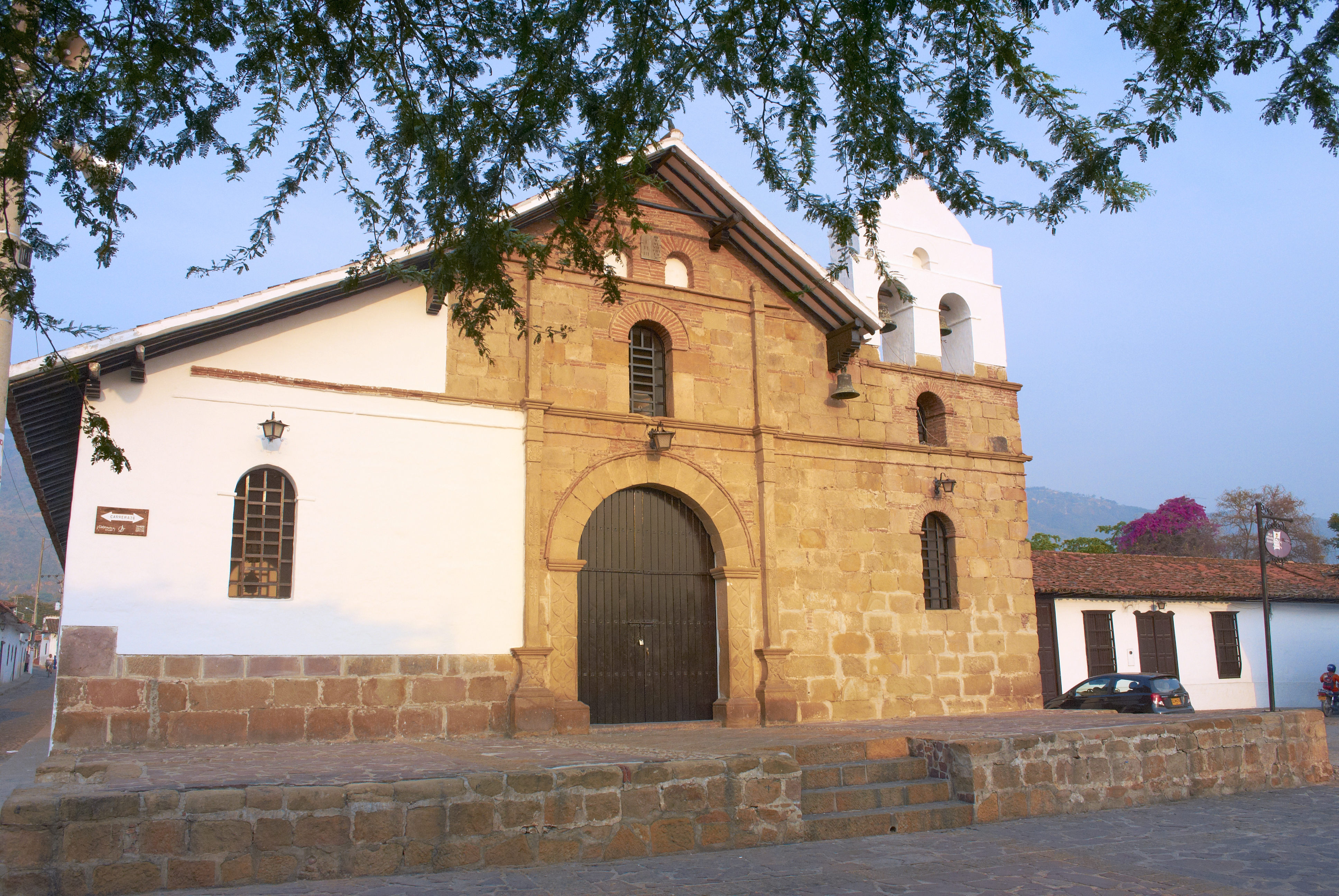 Capilla de las Nieves, Girón, Santander-Colombia